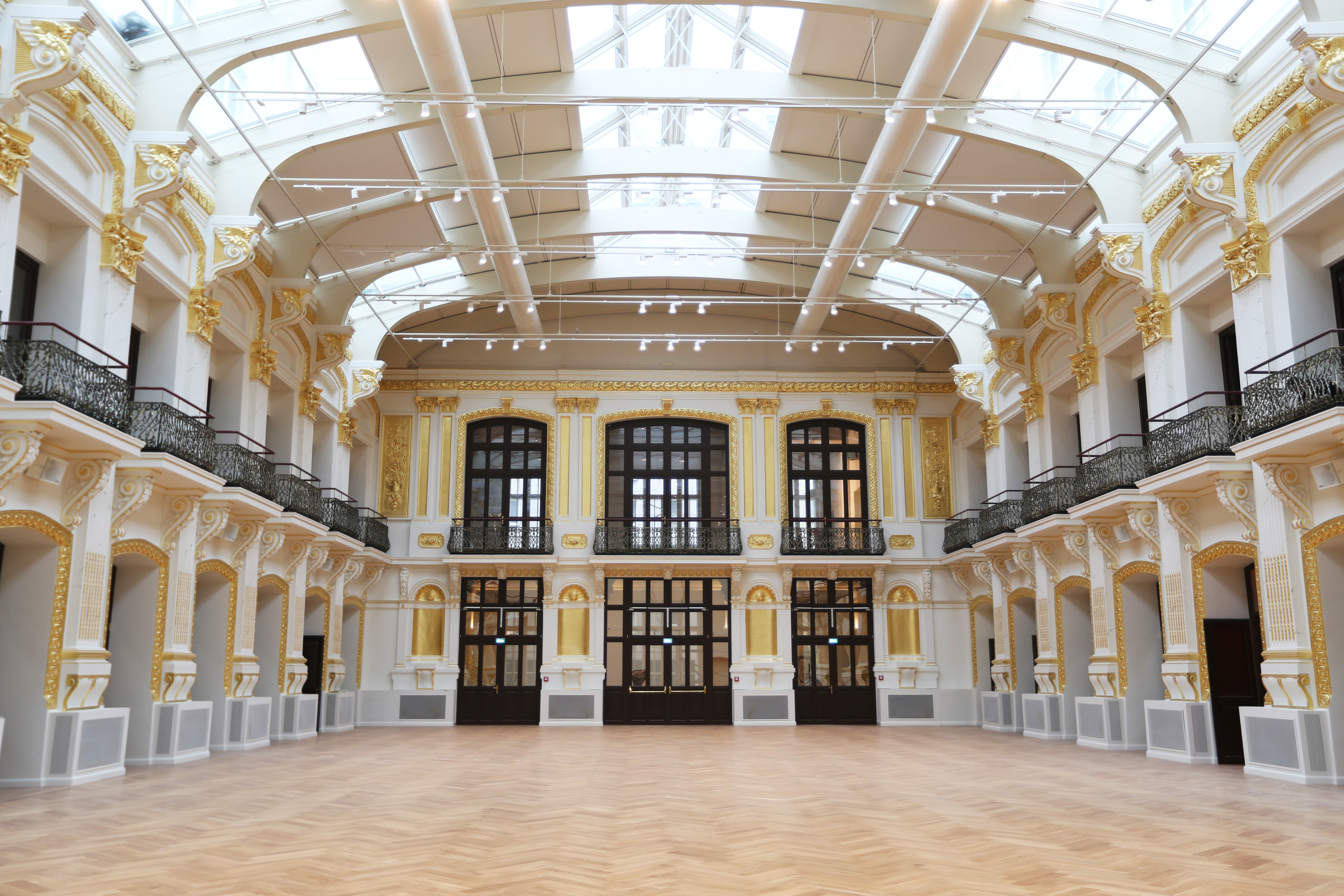 Sophiensäle, ehem. Sophienbad